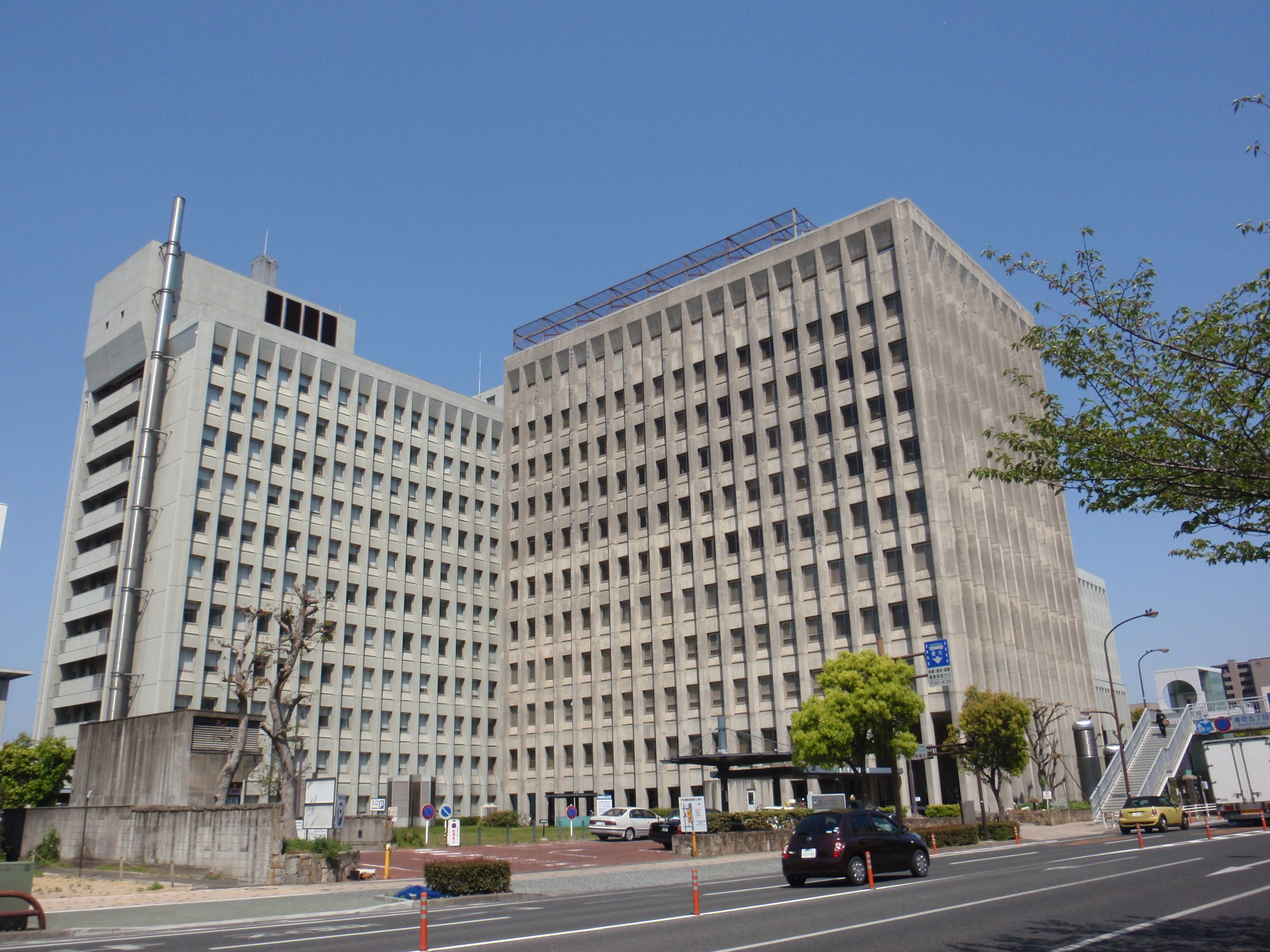 香川県高松市にある香川県立中央病院。